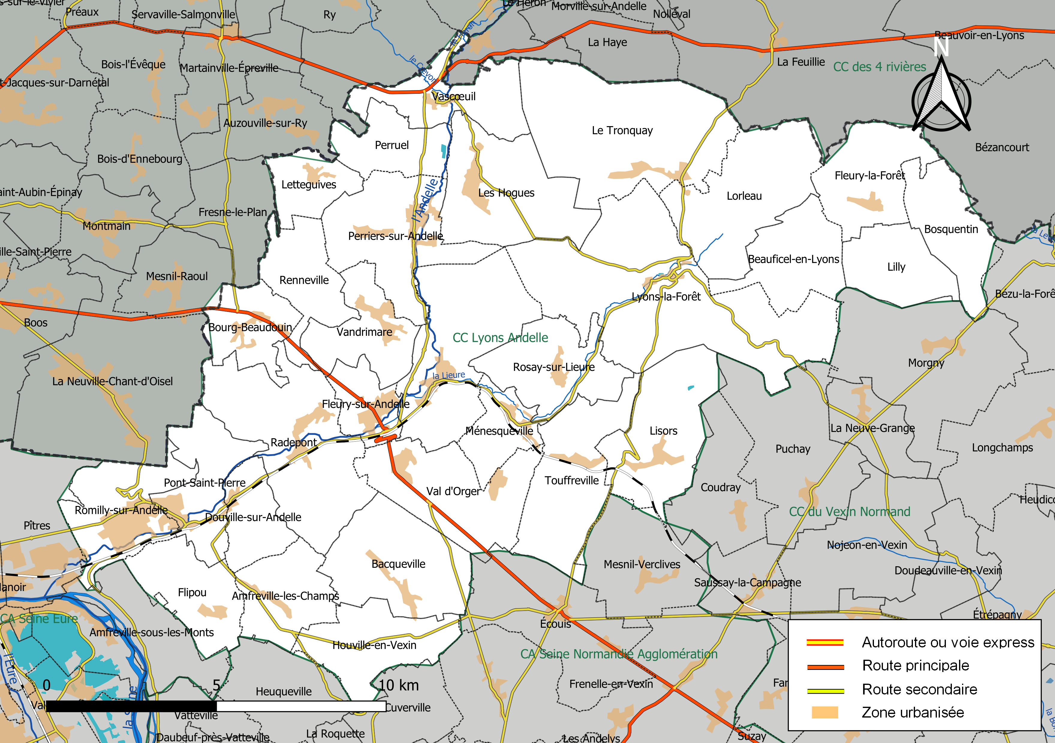 Carte géographique de la Communauté de communes Lyons Andelle, département de l'Eure, France. Composition au 1er janvier 2019.